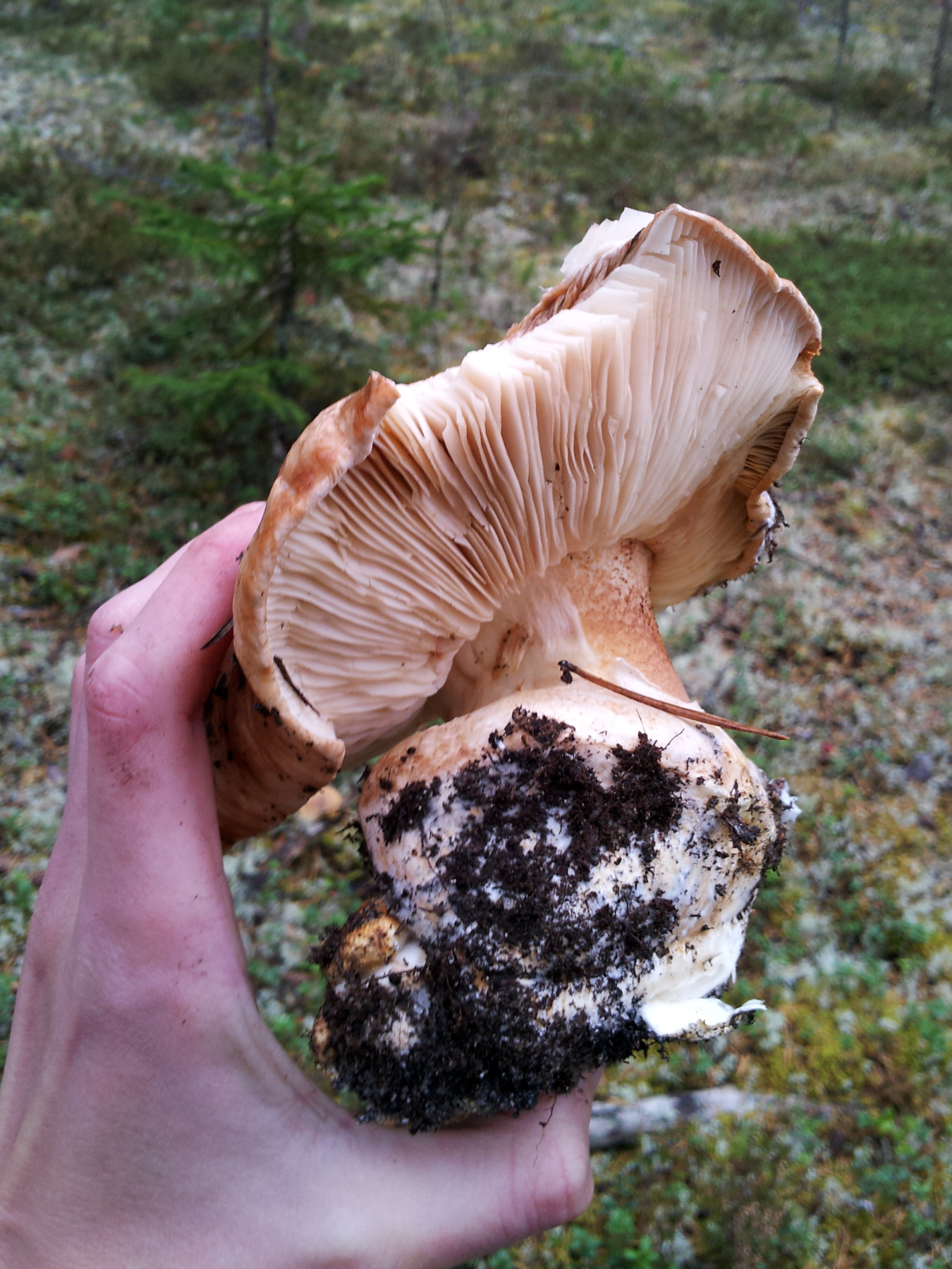 Jättemusseron